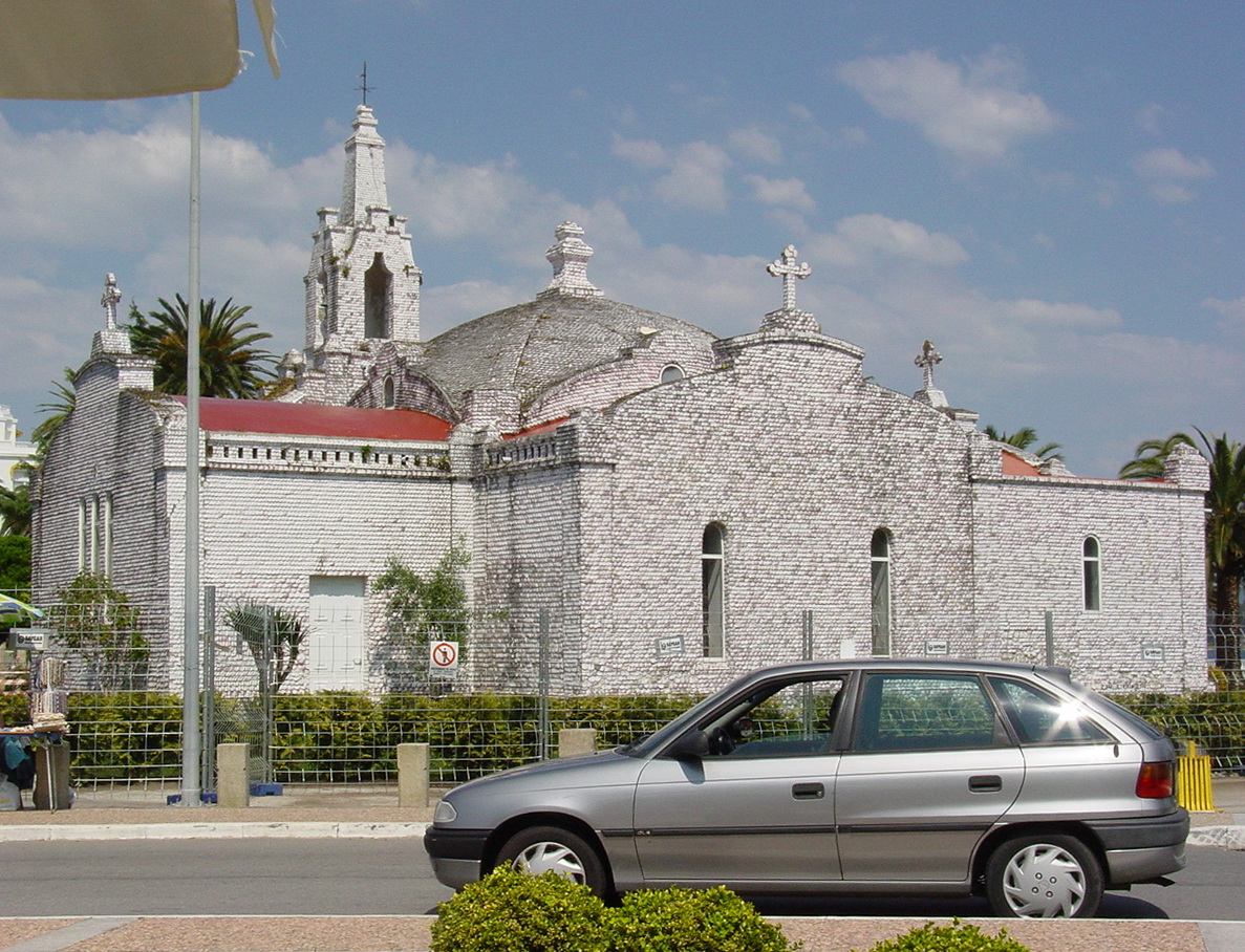 Igrexa da illa da Toxa, provincia de Pontevedra (Galicia). As súas paredes están compostas con cunchas Publish by= Luis Miguel Bugallo Sánchez. Self made